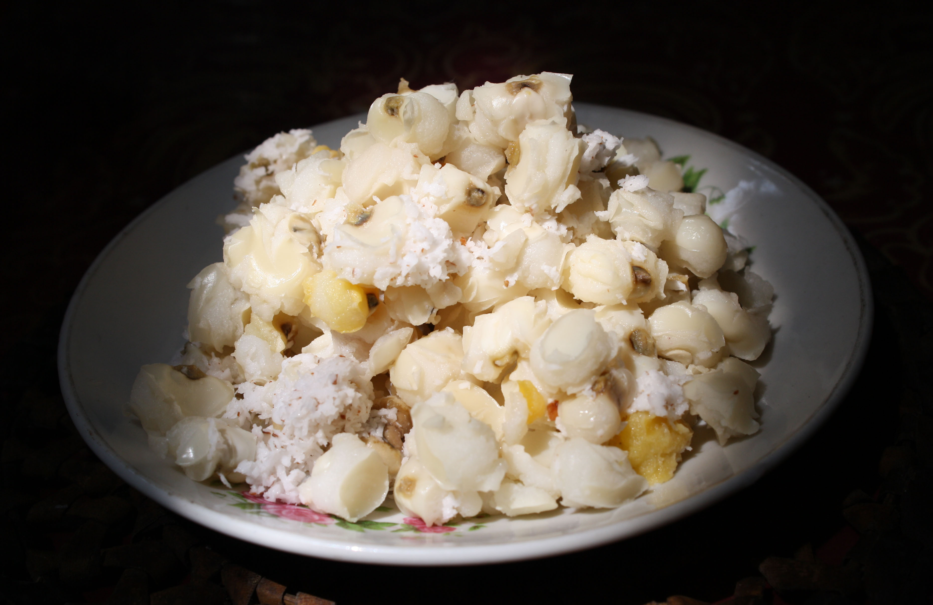 Grontol adalah salah satu makanan atau jajan pasar yang berasal dari Jawa Tengah dan terbuat dari jagung.